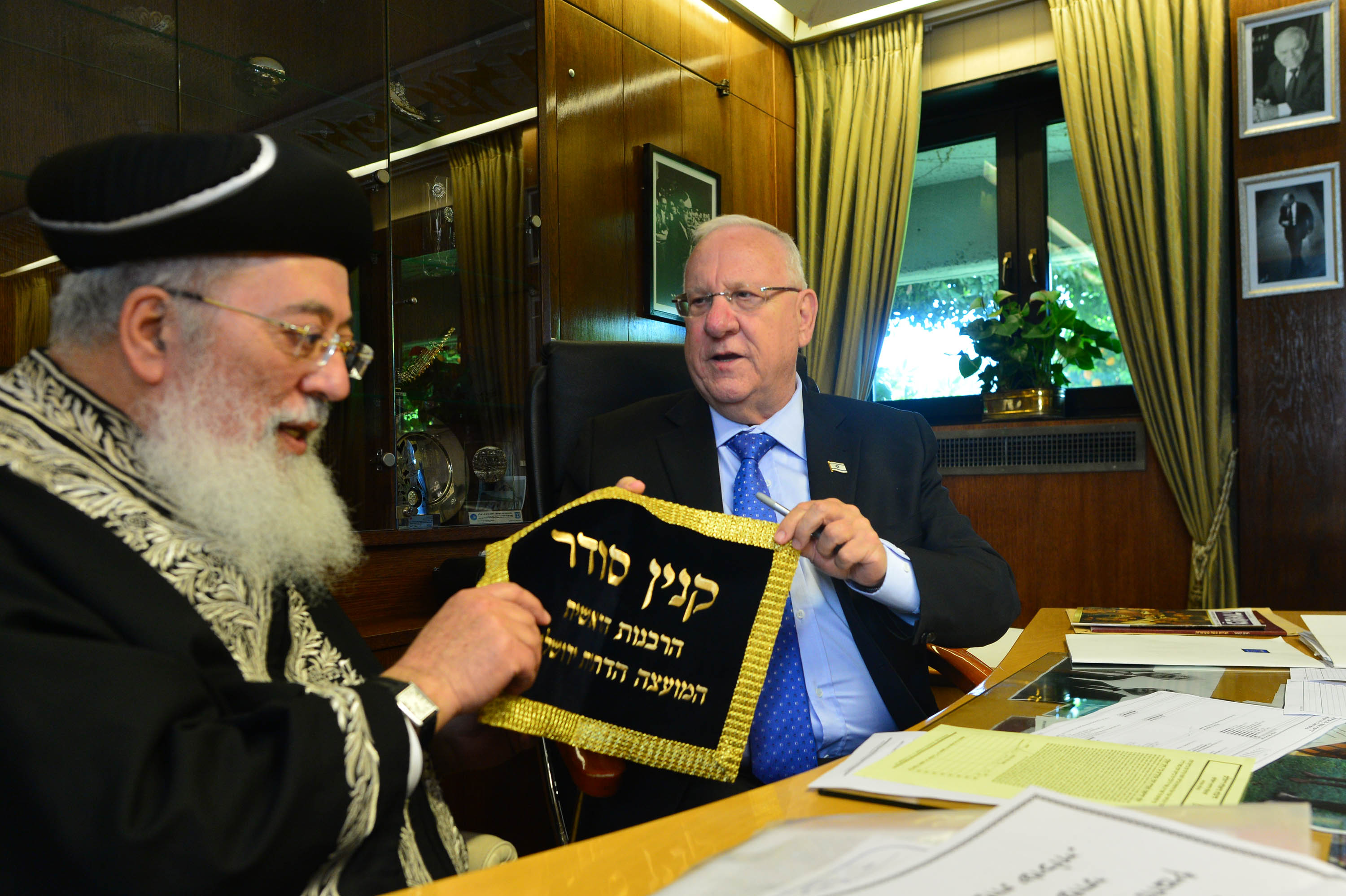 נשיא מדינת ישראל ראובן ריבלין בטקס מכירת חמץ לקראת חג הפסח לרב הספרדי הראשי של ירושלים שלמה עמאר